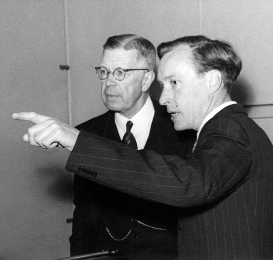 Kung Gustaf VI Adolf vid invigningen av Fysiska institutionen 1951 och Bengt Edlén.